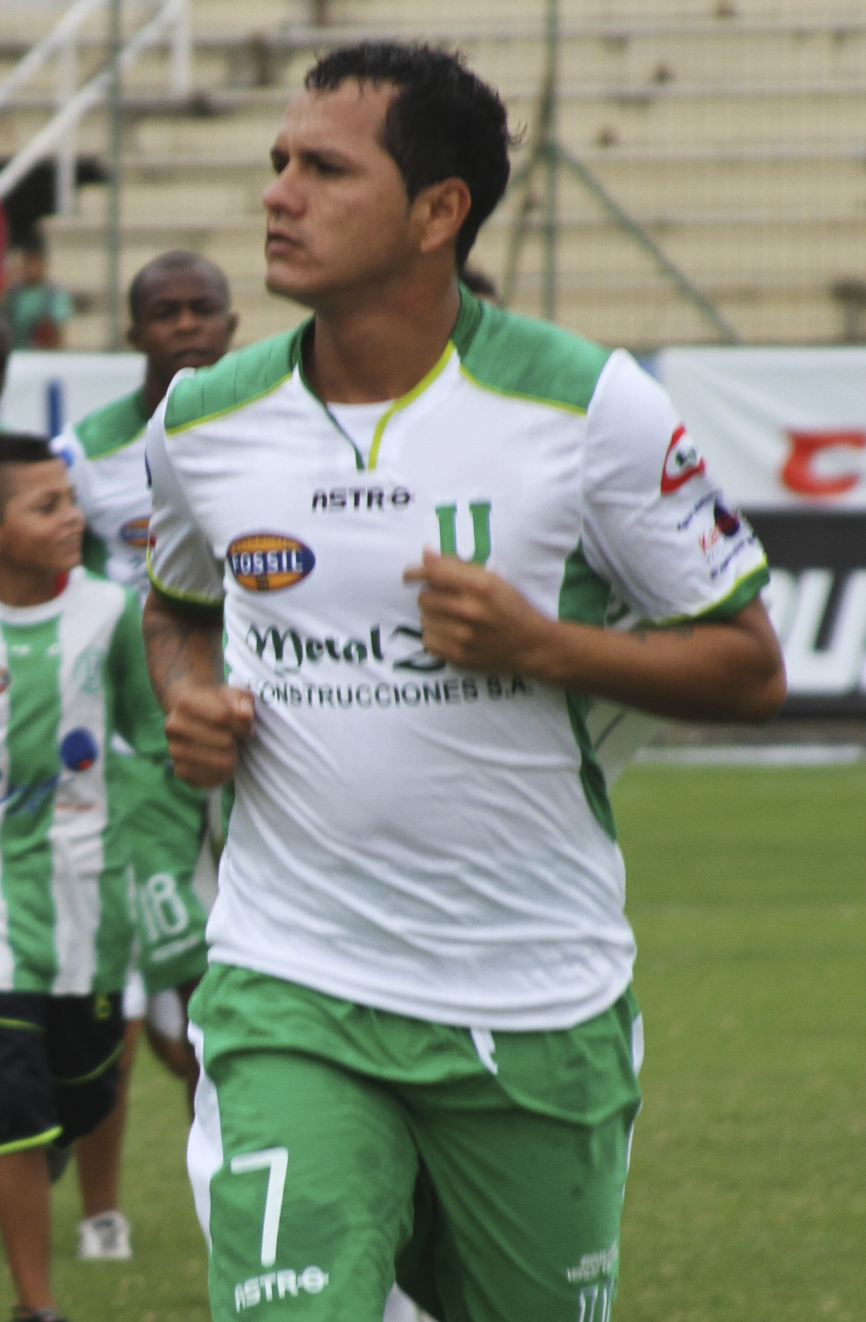 Luis Macías jugando para Liga de Portoviejo en el 2013